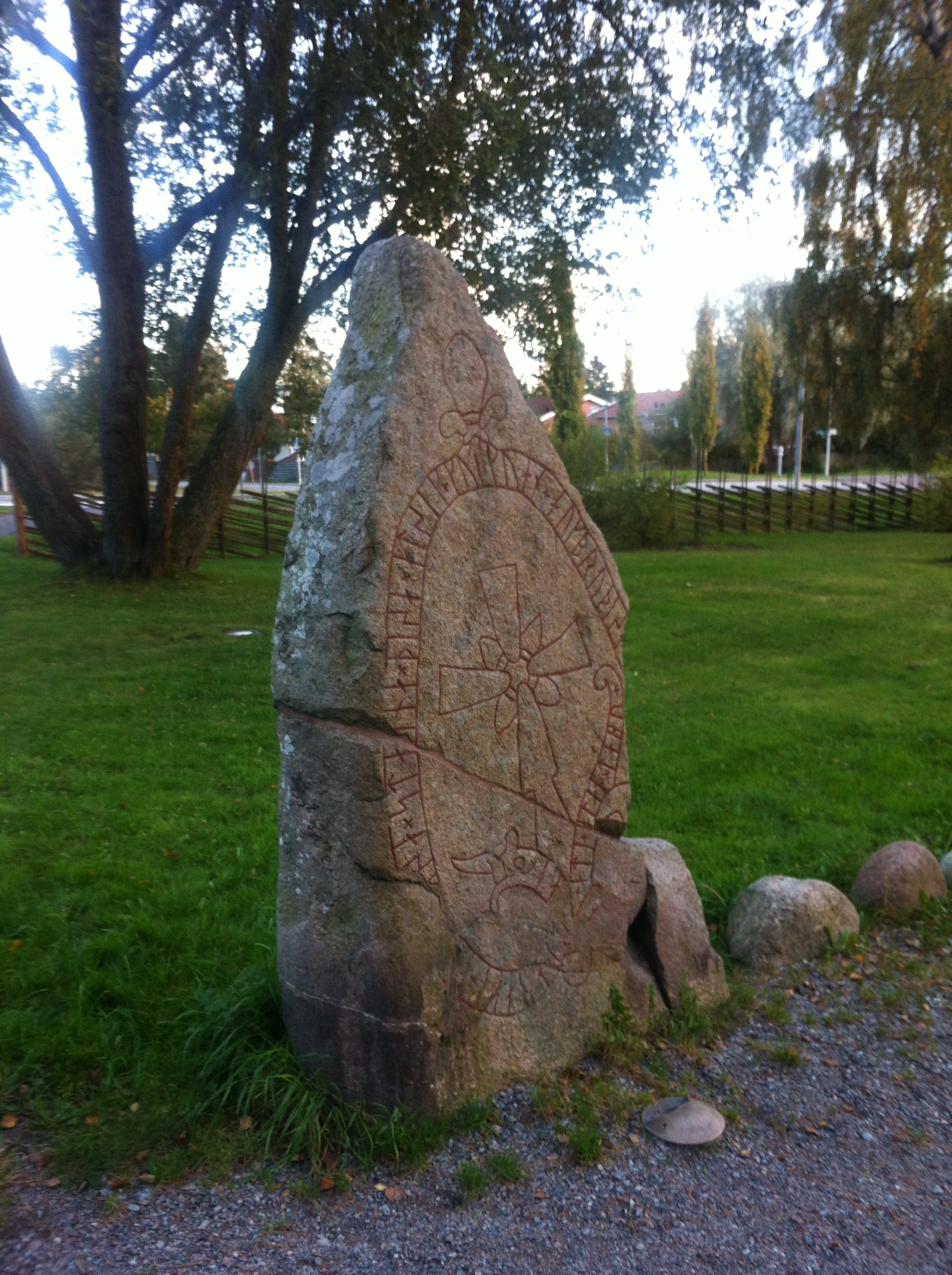 Runstenen U 165 vid Jarlabankes bro i Täby.